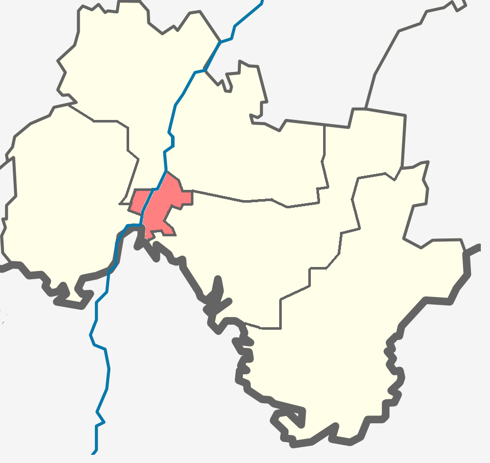 Киришское ГП на карте Киришского района Ленинградской области